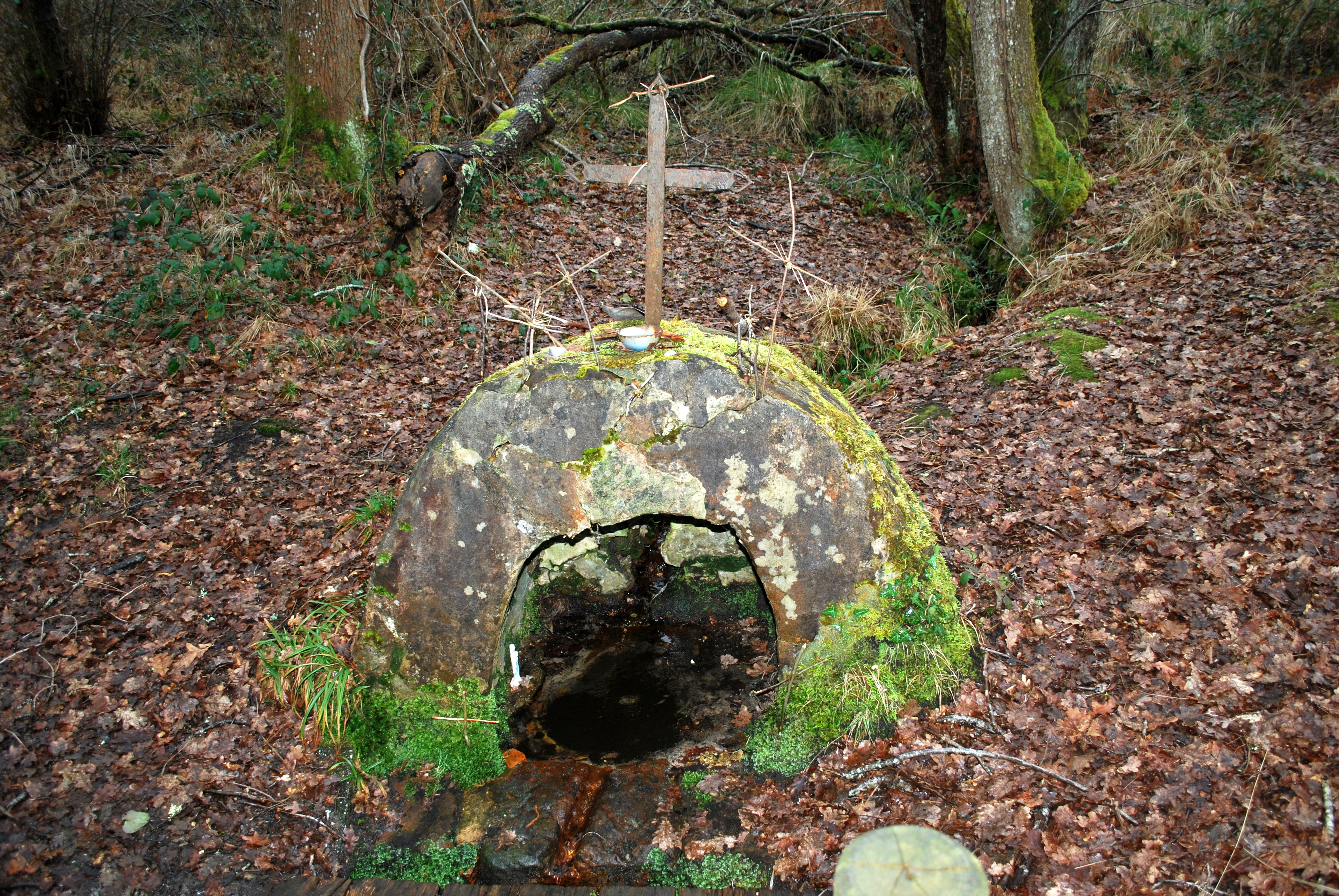 Église Saint-Pierre de Mons de Belin-Bélie